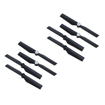 Des helices de drone